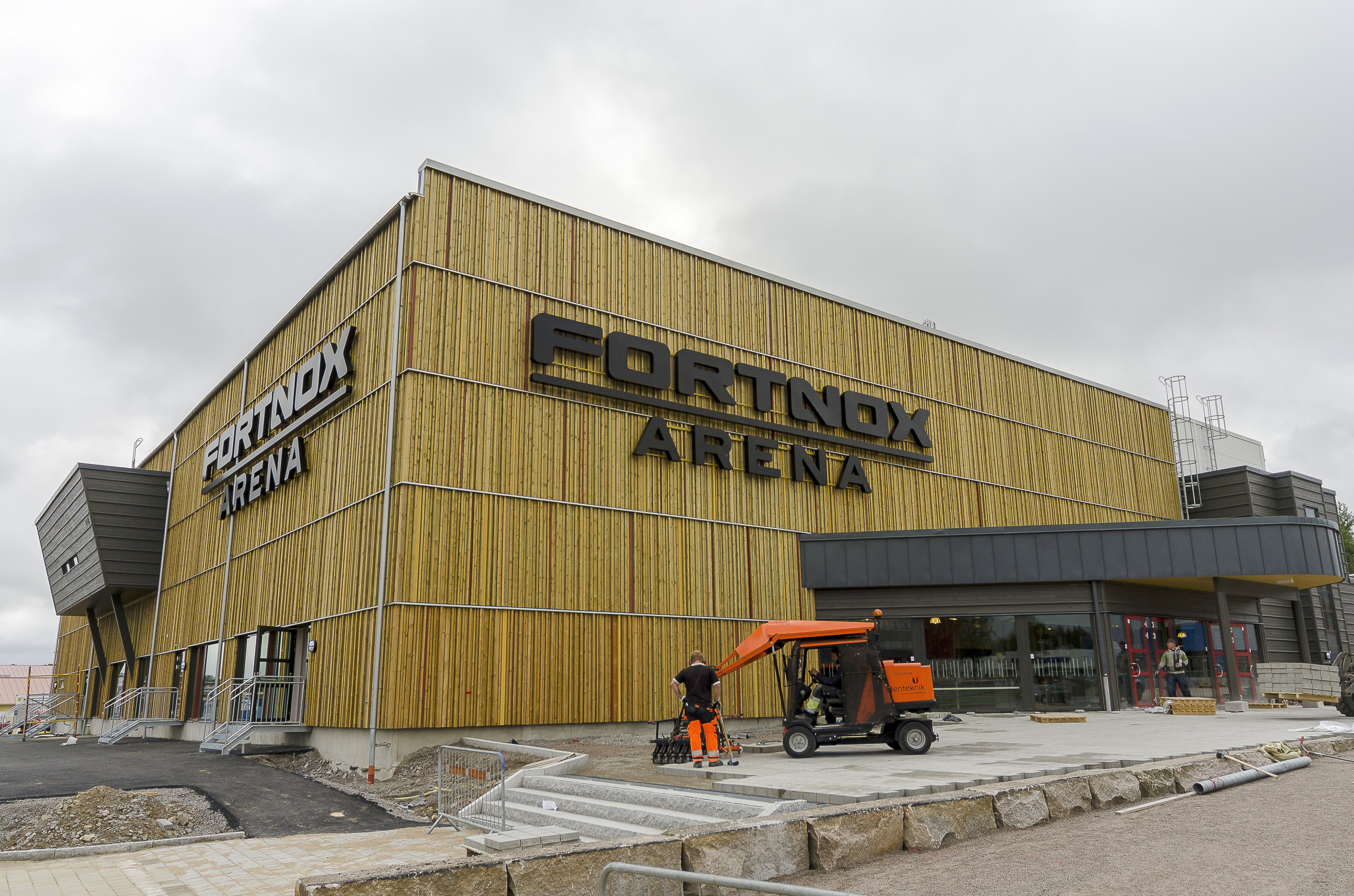 Det slutgiltiga anläggningsarbetet på Fortnox Arena pågår i veckan före invigningen.